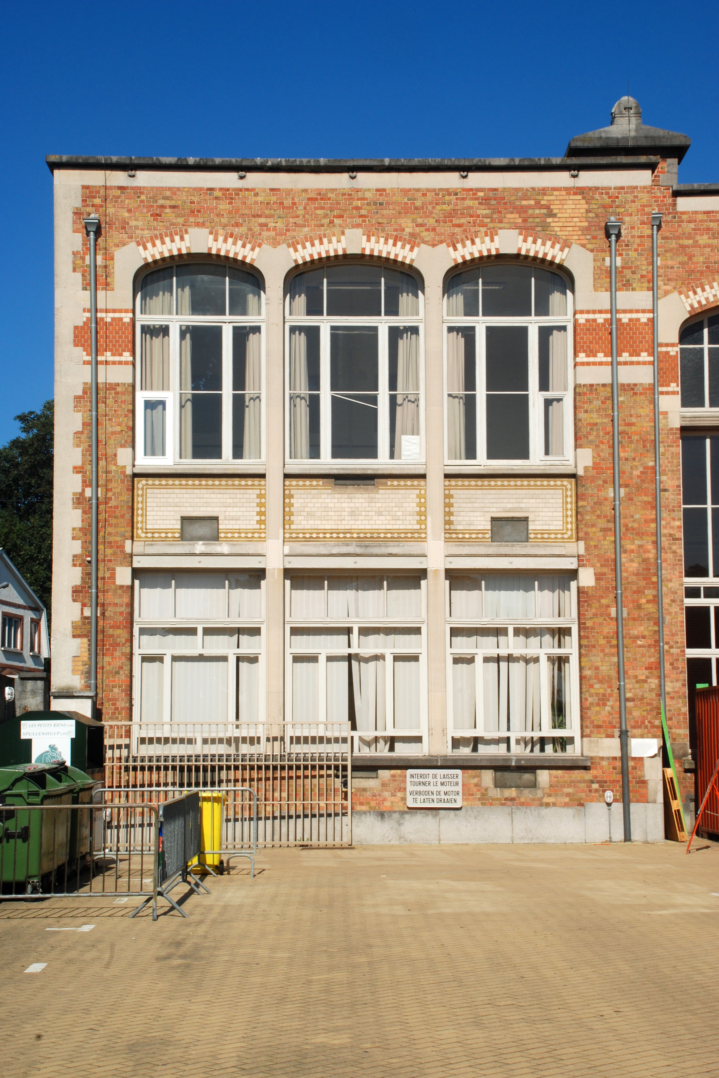 Belgique - Bruxelles - Centre scolaire du Souverain